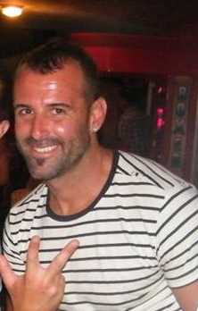 Toni Doblas en junio de 2013.